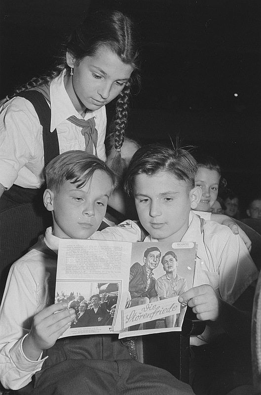 Original image description from the Deutsche Fotothek Drei Pioniere während des Lesens des Filmprospektes